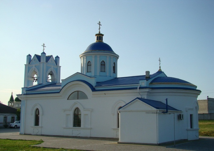 Свято-Успенская церковь на территории крепости Измаил